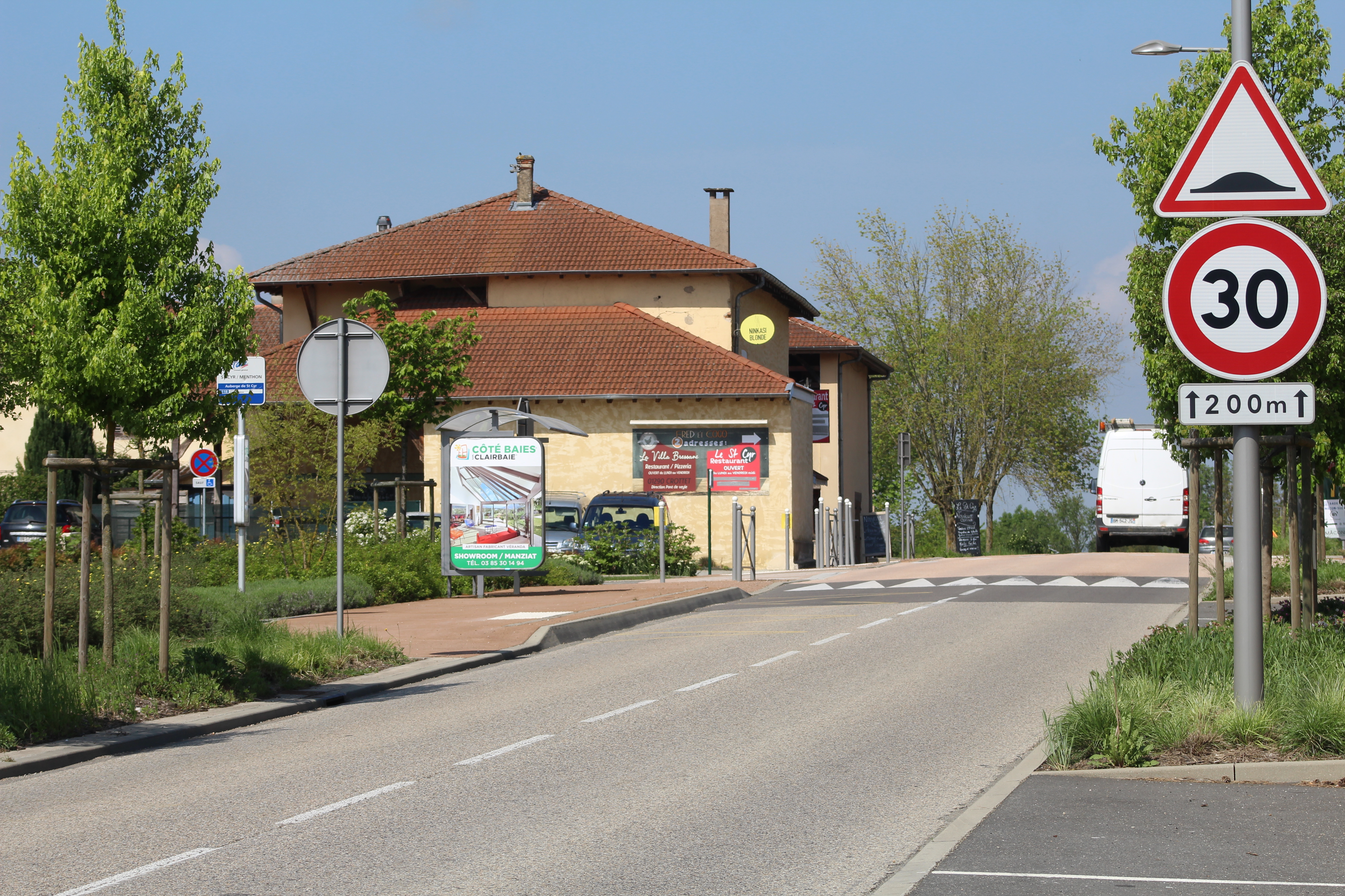 Route de Bourg, Saint-Cyr-sur-Menthon.